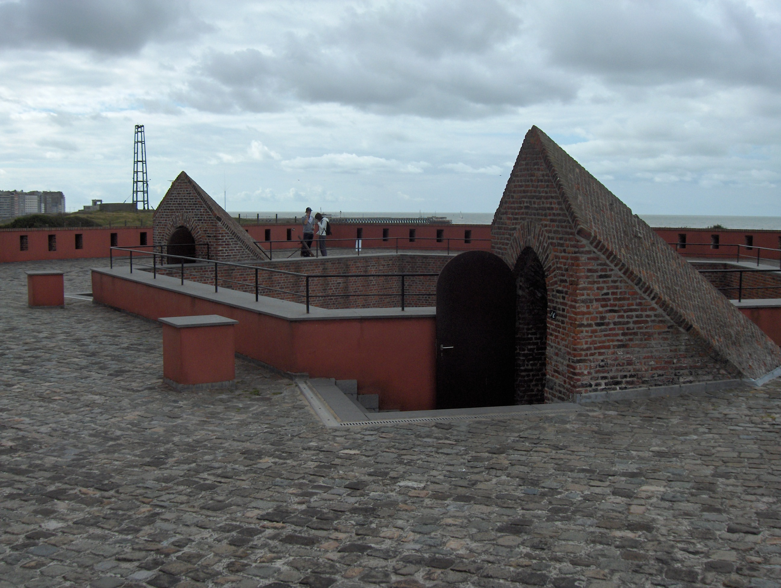 Roof, Fort Napoleon, Oostende, Belgium